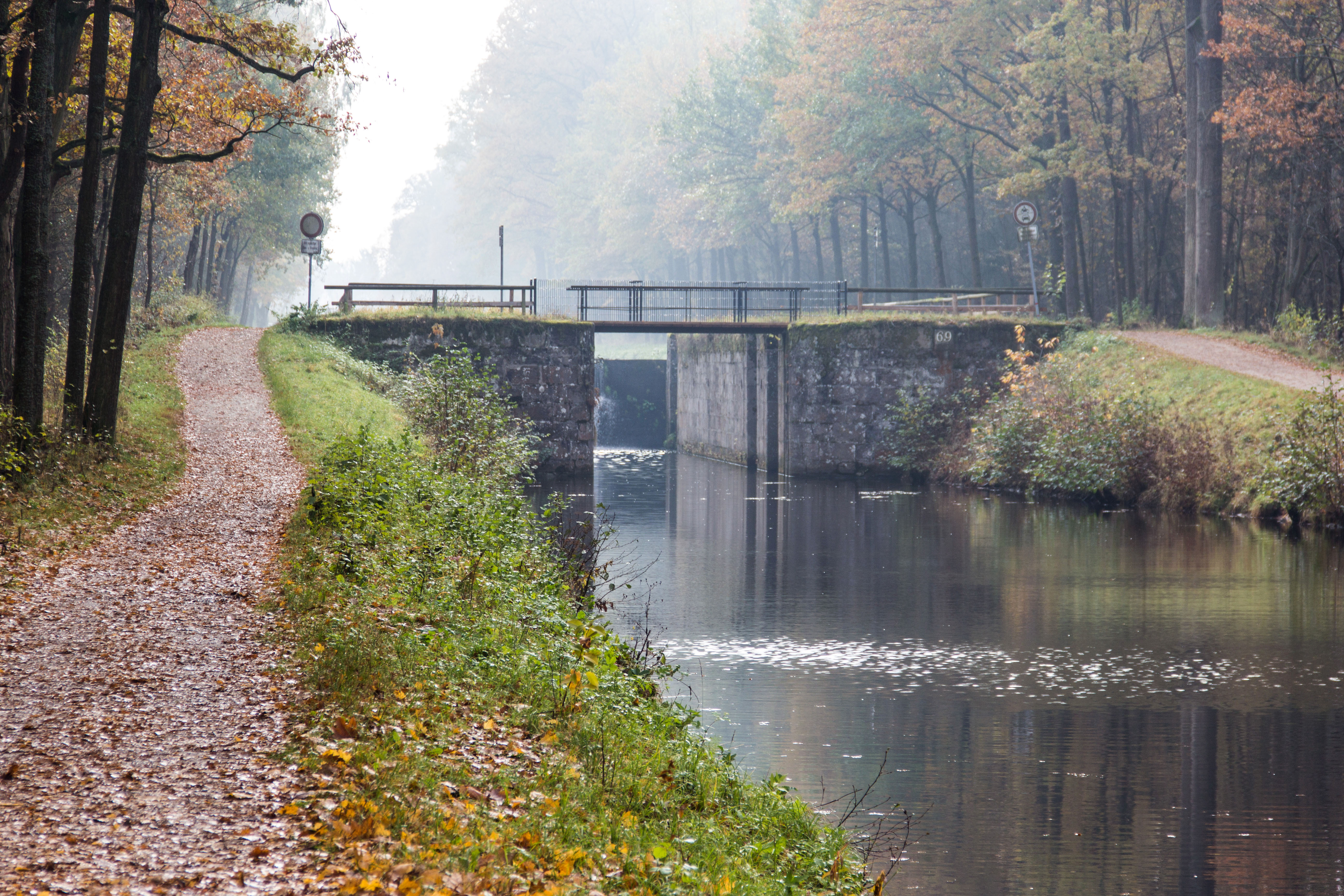 Ludwig-Donau-Main-Kanal, Schleuse 69